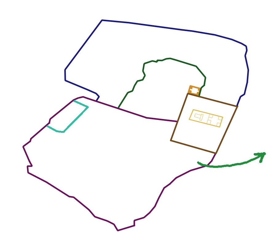 ירושלים 70 - הגיחה אל הלגיון ה-10